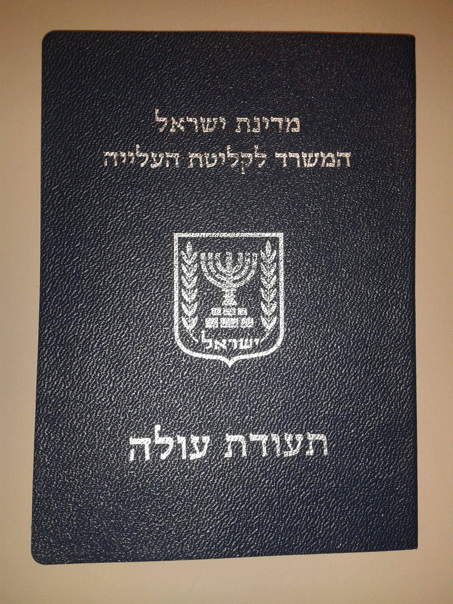 Israeli New Immigrant document